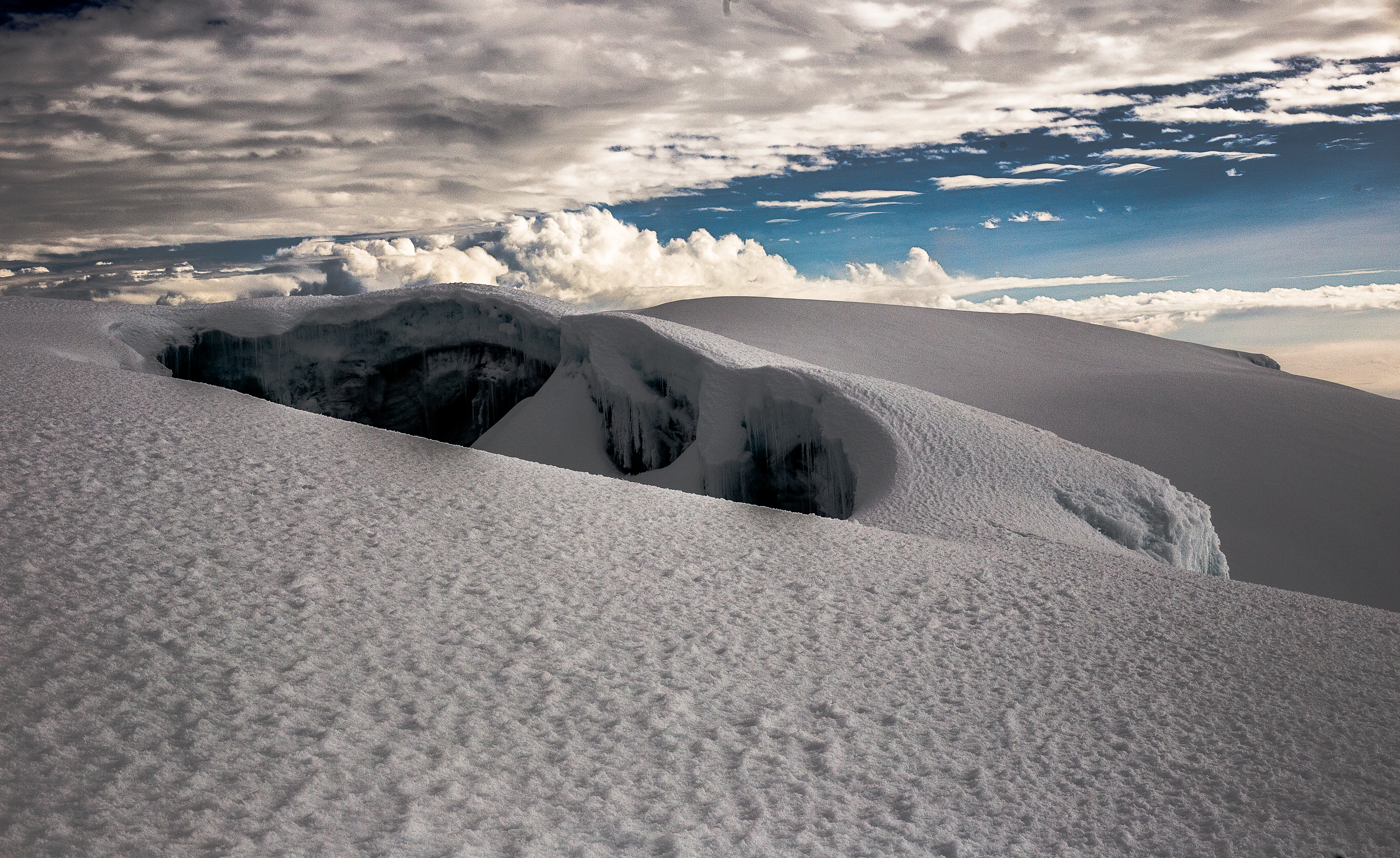 Área glaciar del volcán nevado del Tolima. se aprecian grietas producto del deshielo progresivo que sufren las masas glaciares de Colombia. Esta fotografía fue tomada en un área protegida de Colombia con el código 11 del RUNAP.